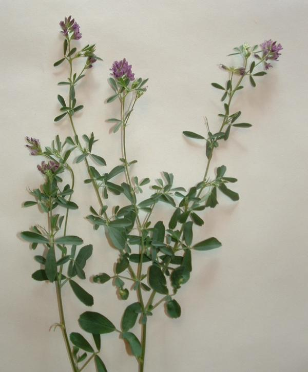 Medicago - Lucerne - Alfalfa